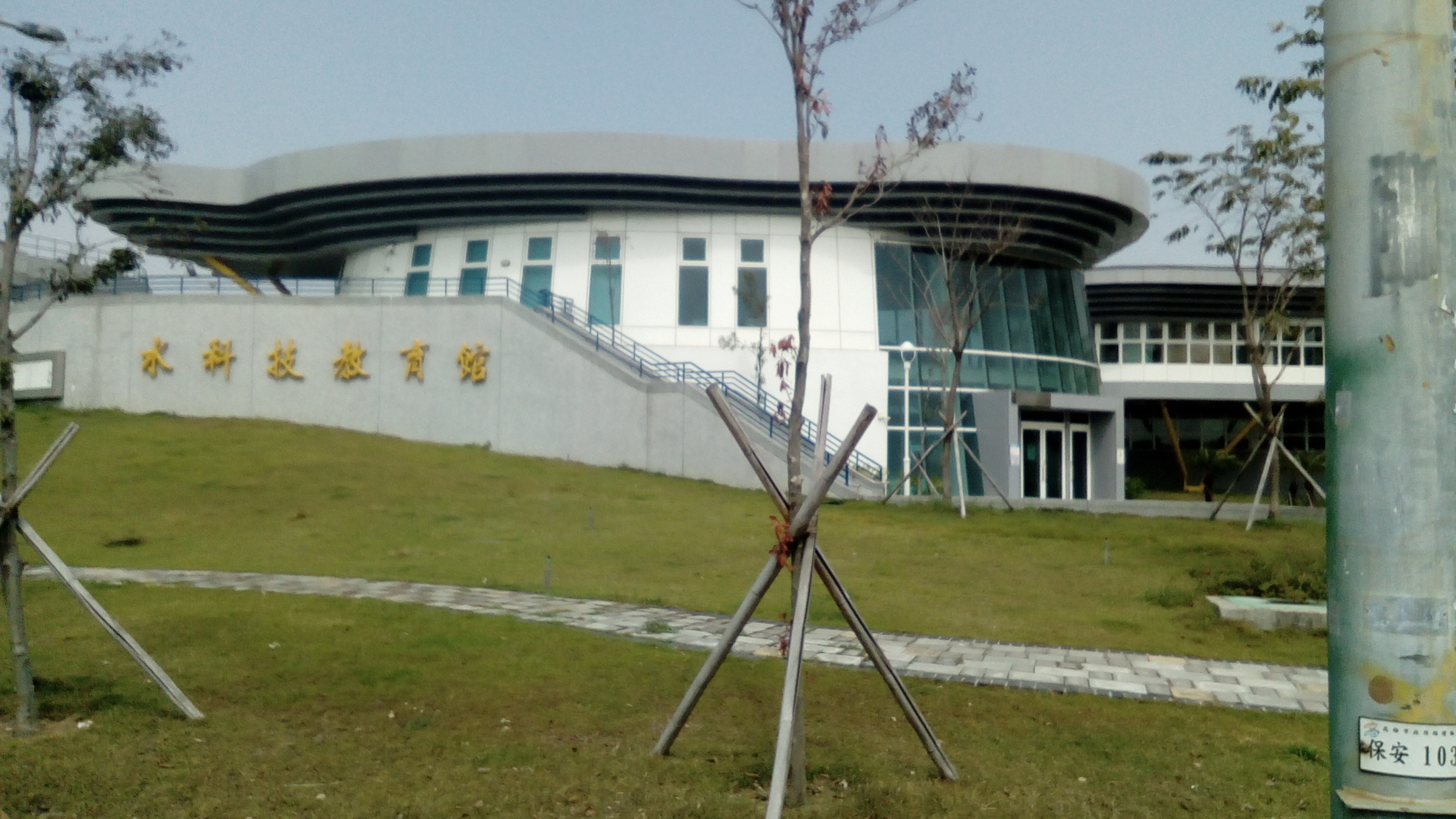 位於鳳山區保雅路